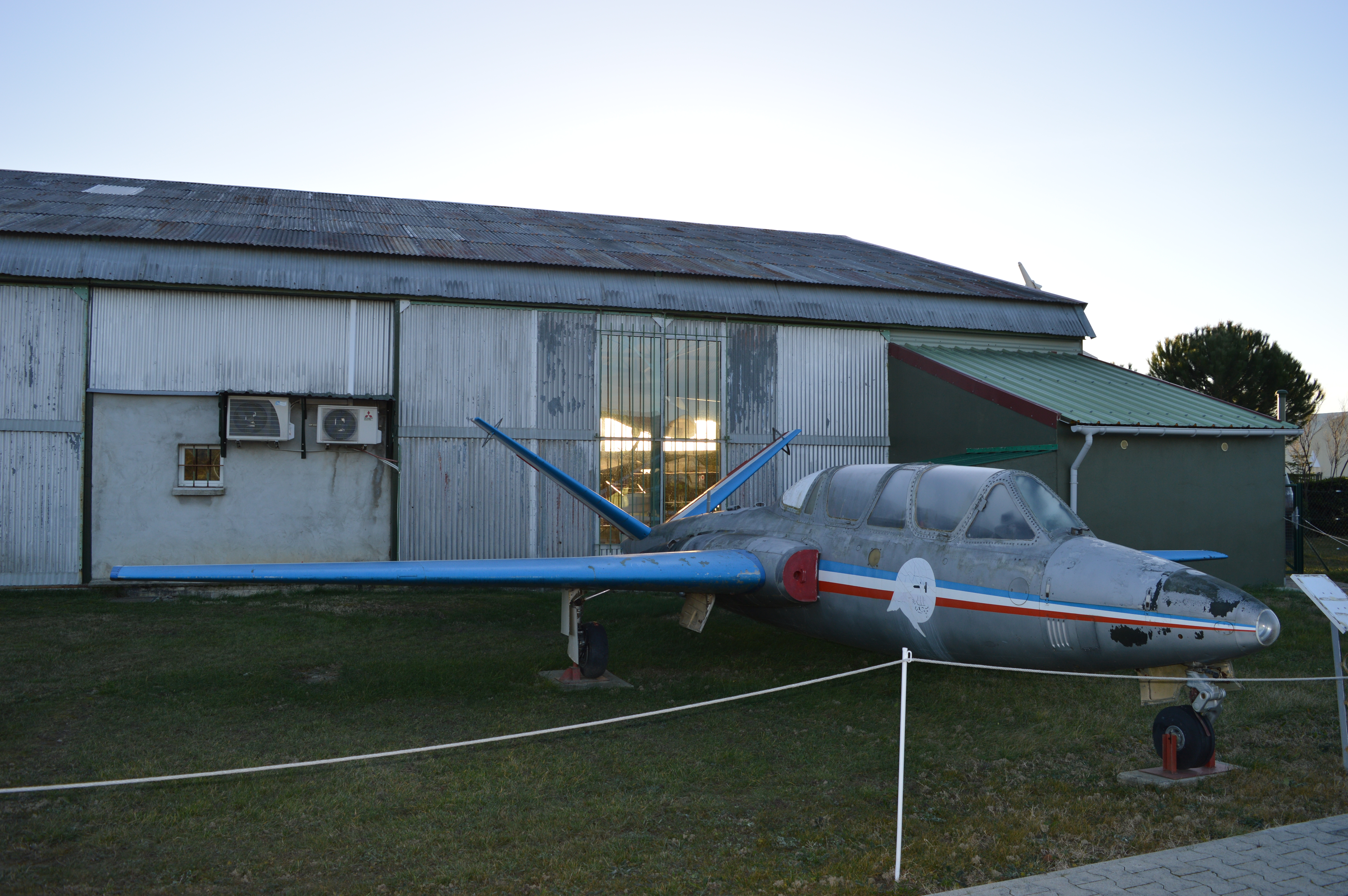 FOUGA MAGISTER CM170 MEAC